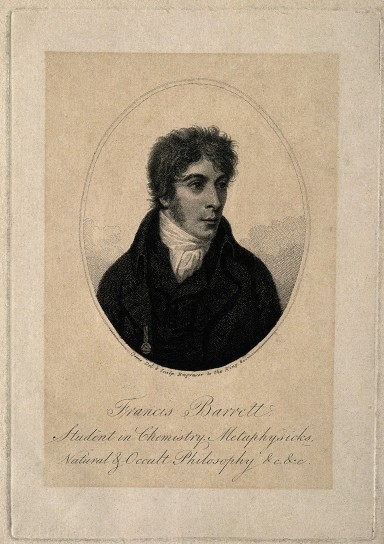 Portrait von Francis Barrett, Autor des Buches "The Magus" (1801)